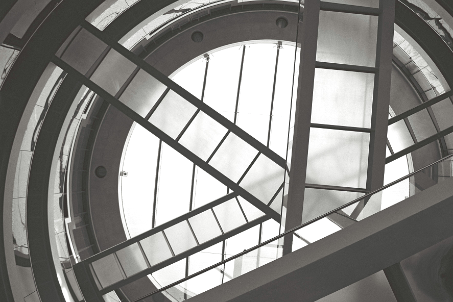 EMBL Heidelberg innen